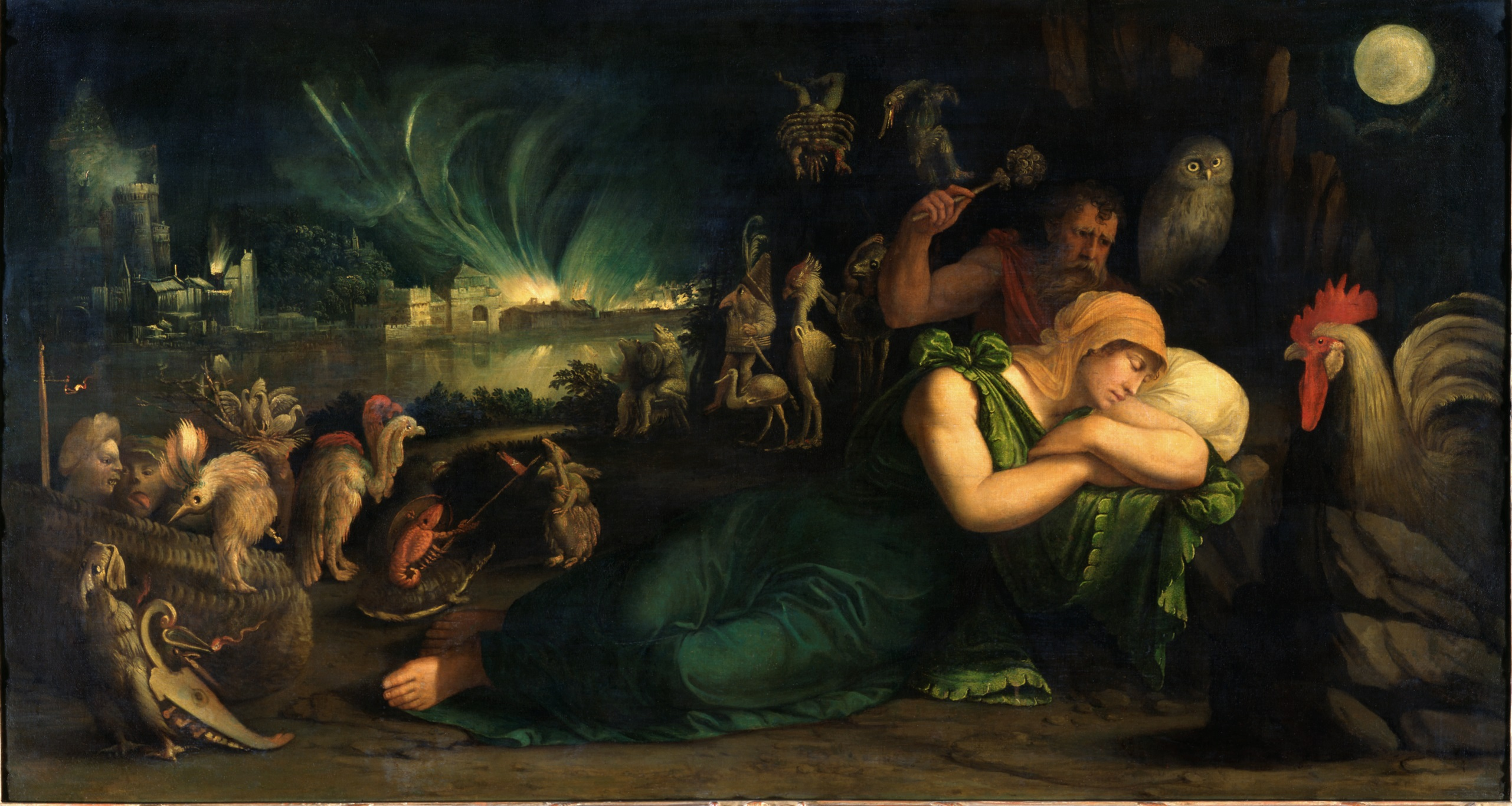 La notte